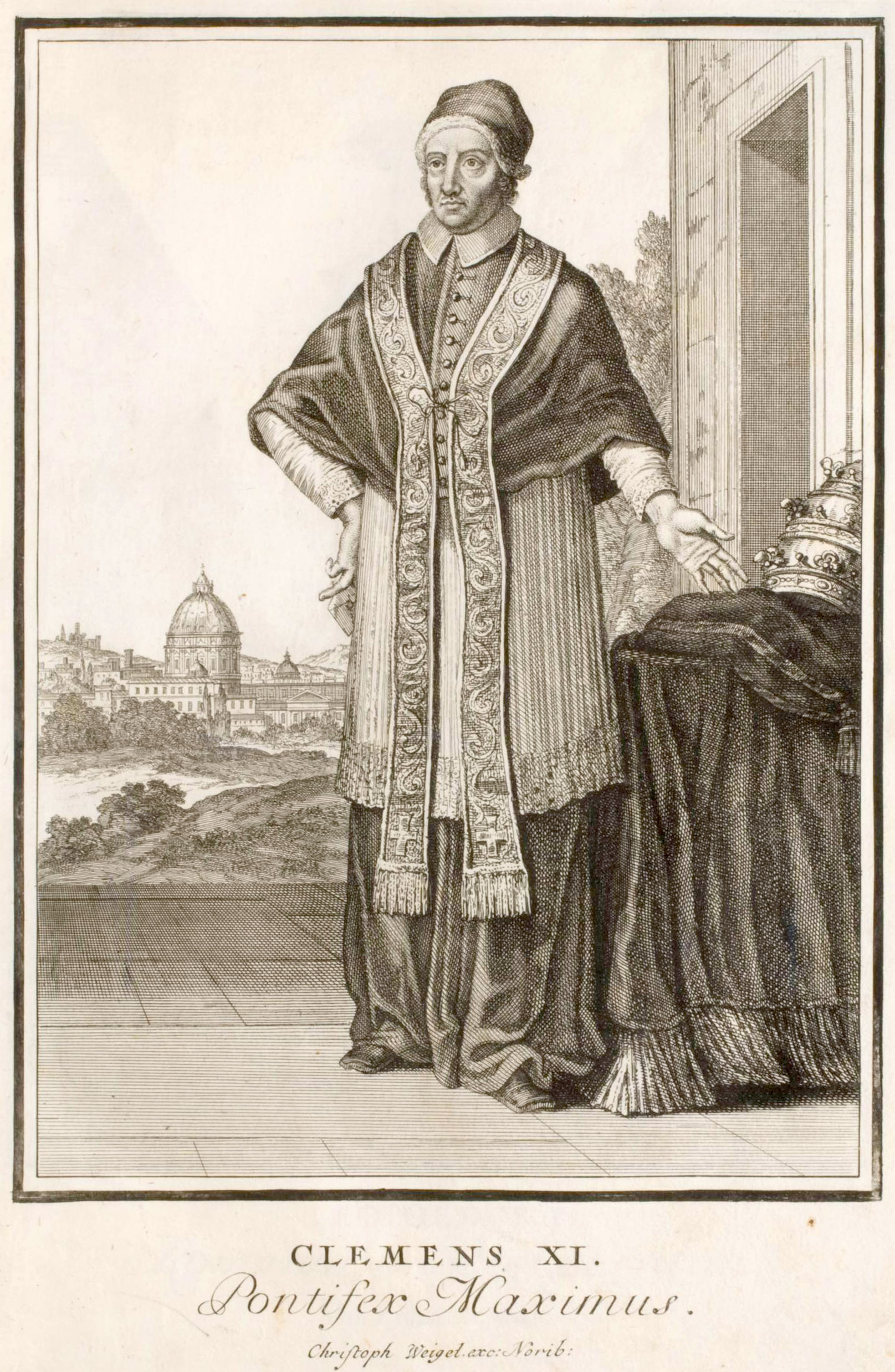 Neu-eröffnete Welt-Galleria. ..., Nürnberg 1703. 1. Clemens XI. Pontifex Maximus.